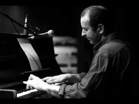 Verebes György zongorázik